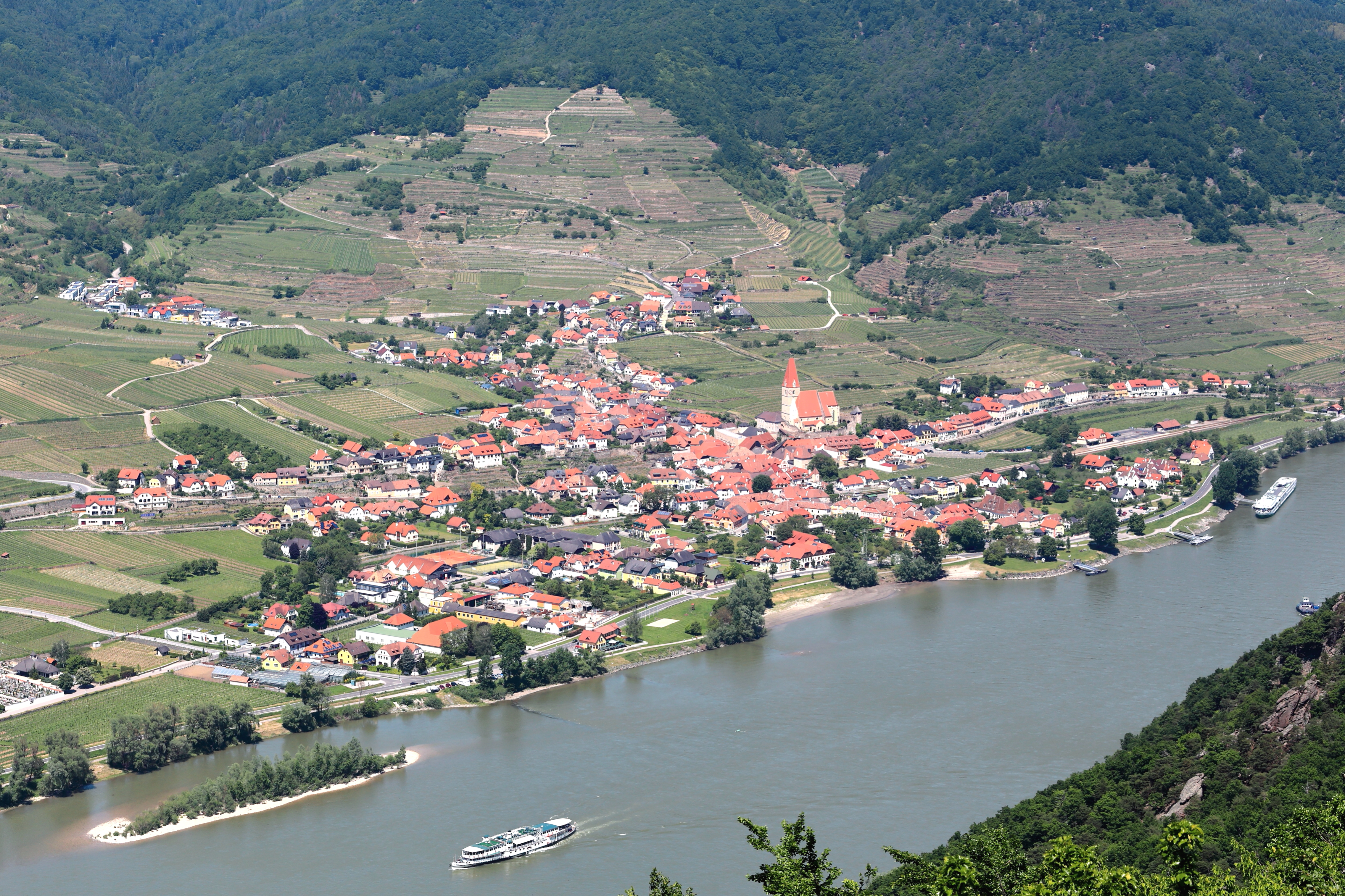 Südansicht des Hauptortes Weißenkirchen in der Wachau der niederösterreichischen Marktgemeinde Weißenkirchen in der Wachau.